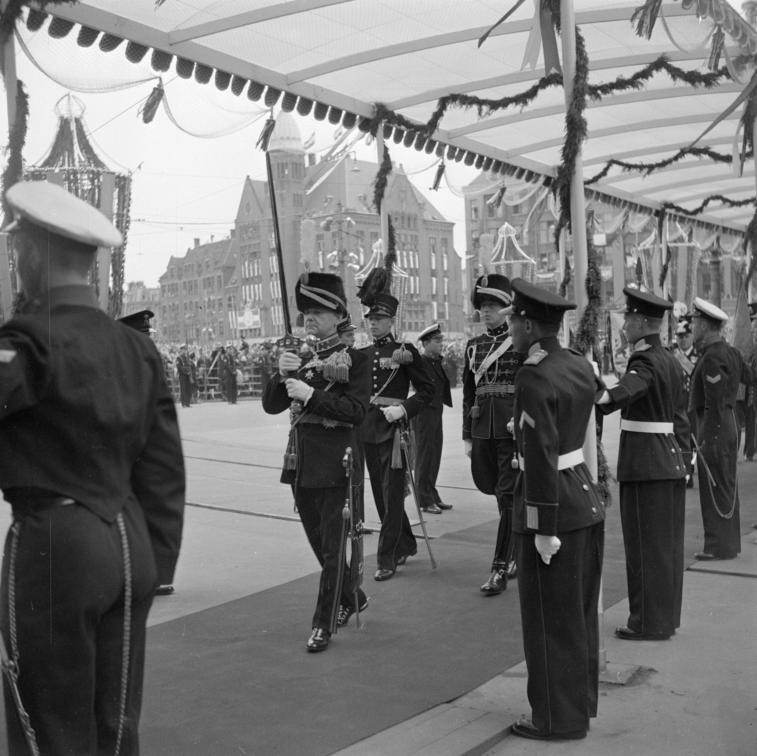 Collectie / Archief : Fotocollectie Van de Poll Reportage / Serie : Troonsafstand koningin Wilhelmina / Inhuldiging van koningin Juliana Beschrijving : Maandagochtend (volgnummer 14-39). De koninklijke stoet onder de pergola, op weg van het paleis naar de Nieuwe Kerk.Luitenant-generaal mr. H.J. Kruls, chef van de generale staf, draagt het ontblote rijkszwaard Datum : 6 september 1948 Locatie : Amsterdam, Noord-Holland Trefwoorden : inhuldigingen, koninklijk huis, militairen, rijkszwaarden Persoonsnaam : Kruls, H.J. Fotograaf : Poll, Willem van de Auteursrechthebbende : Nationaal Archief Materiaalsoort : Negatief (zwart/wit) Nummer archiefinventaris : bekijk toegang 2.24.14.02 Bestanddeelnummer : 255-7058